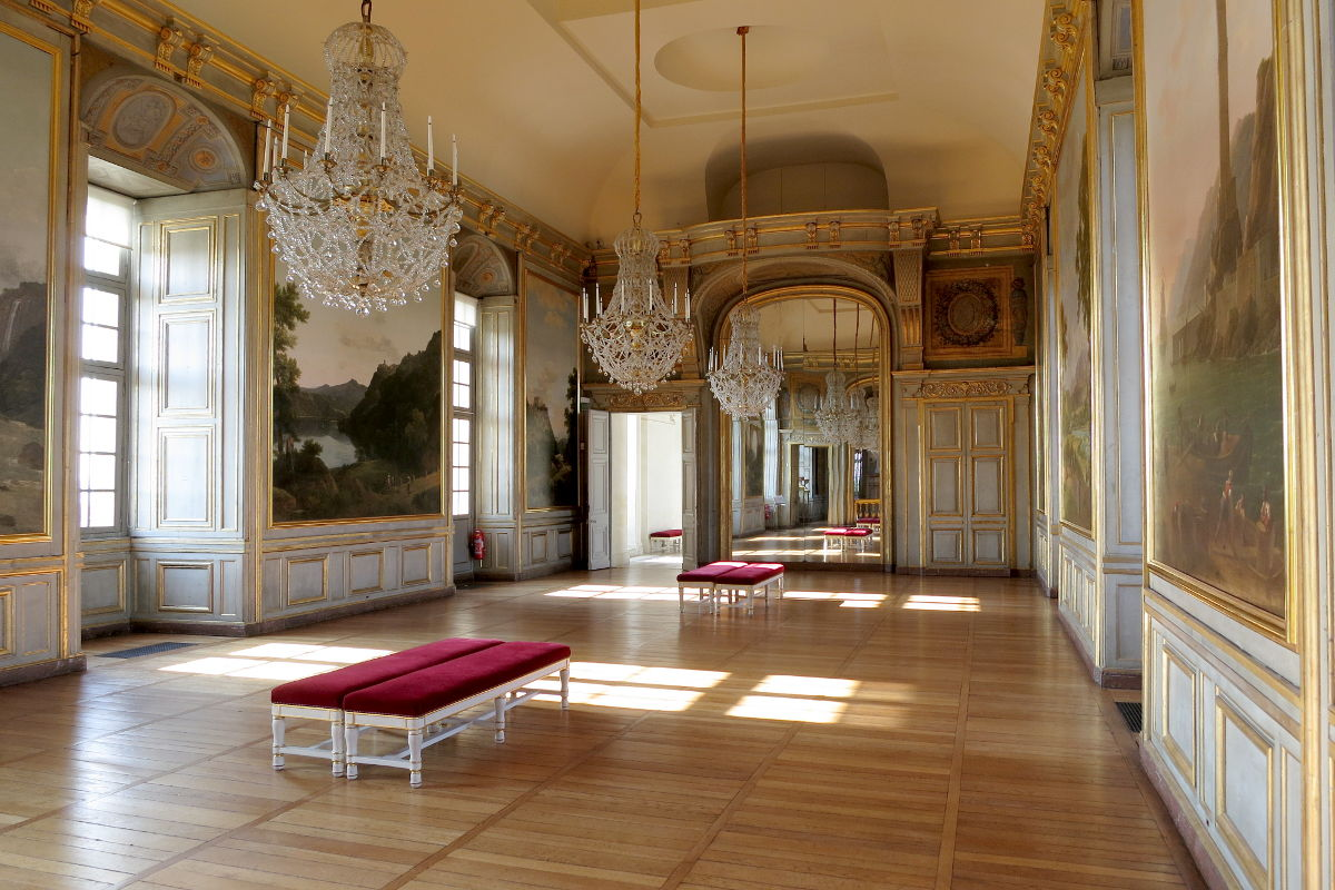 Château de Maisons-Laffitte, la grande salle, peintures murales de Jean-Victor Bertin et Xavier Bidault commandées en 1819